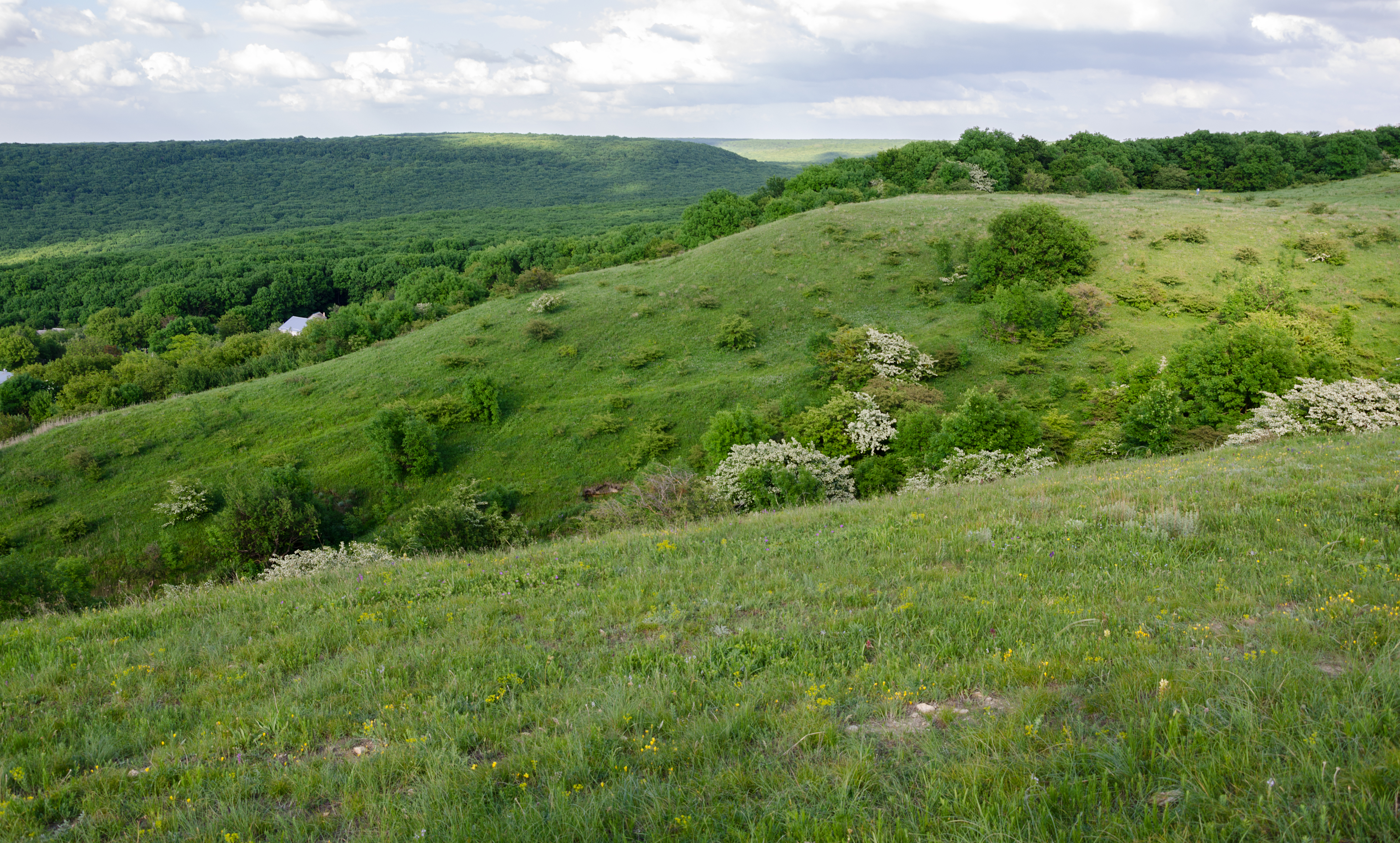 Беспутская поляна: Расположен в 5 км к западу от города Ставрополя. Территория заказника вытянута с юго-востока на северо-запад и большей частью окружена лесом, на северо-востоке граница проходит по кромке плато с крупным падением и на крайнем северо-западе включает два останца. Высота Беспутской поляны от 596,0 до 622,2 м н.у.м,Шпаковский район, Ставропольский край This image is related to the protected area of Russia number 2610190